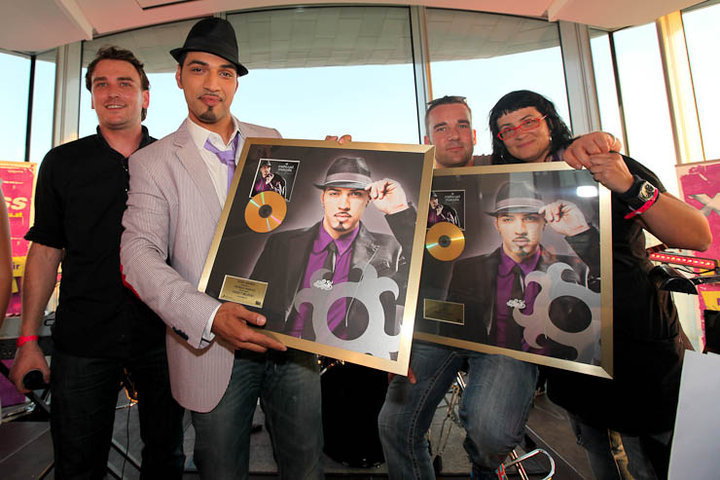 Beschreibung:Mehrzad Marashi in Austria Quelle:Bild selbst erstellt Datum:Juni,12 2010 Autor:Sanin Huskic